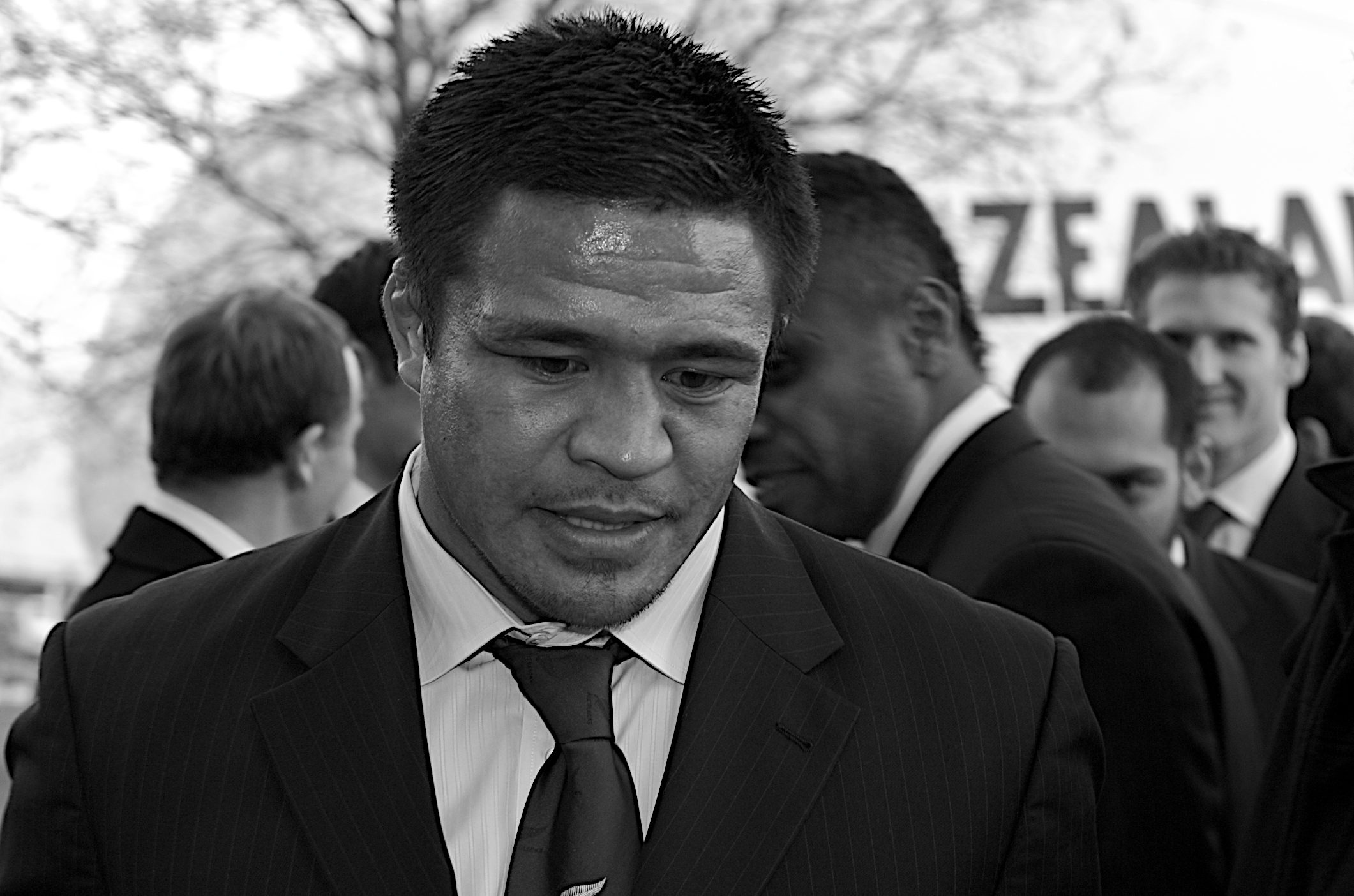 Modest star